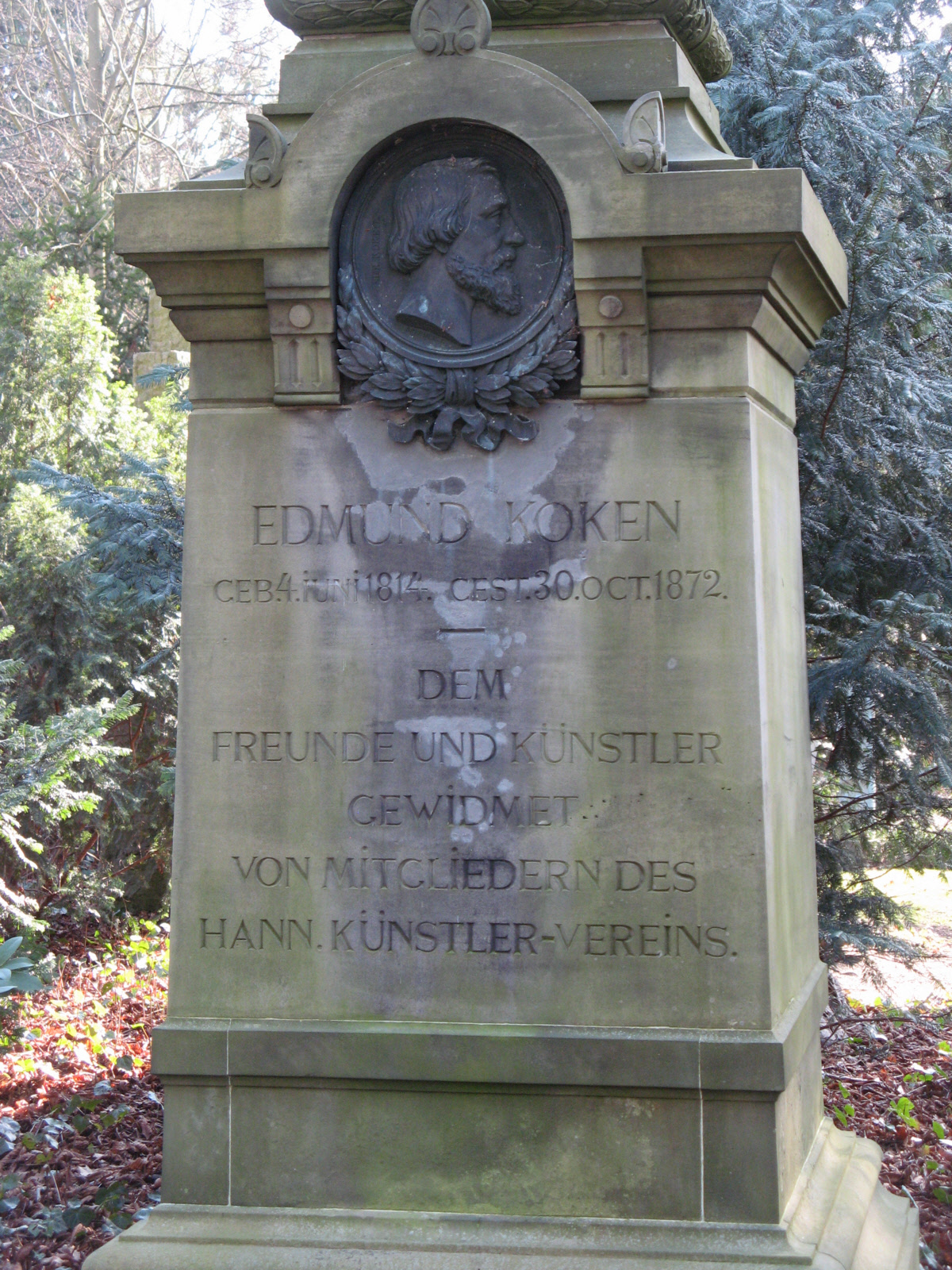 Detail des Grabmals von Edmund Koken auf dem Stadtfriedhof Engesohde in Hannover, Abteilung 13, Grabnummer 3 a–d